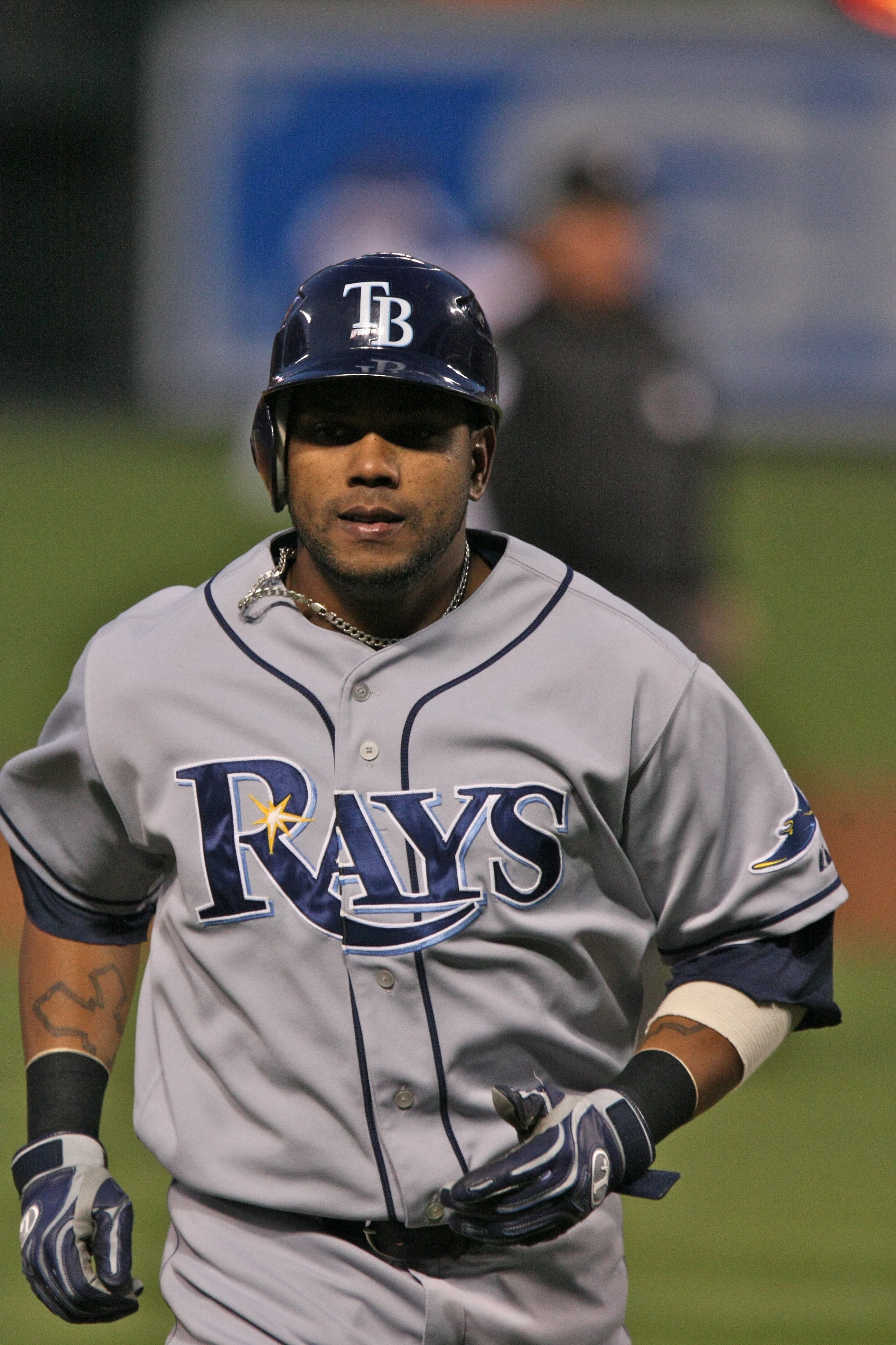 Willy Aybar